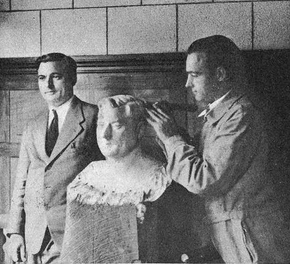 Francisco Vázquez Díaz Compostela, tallando o busto "A Pepe", fotografía en Vida Gallega 1933